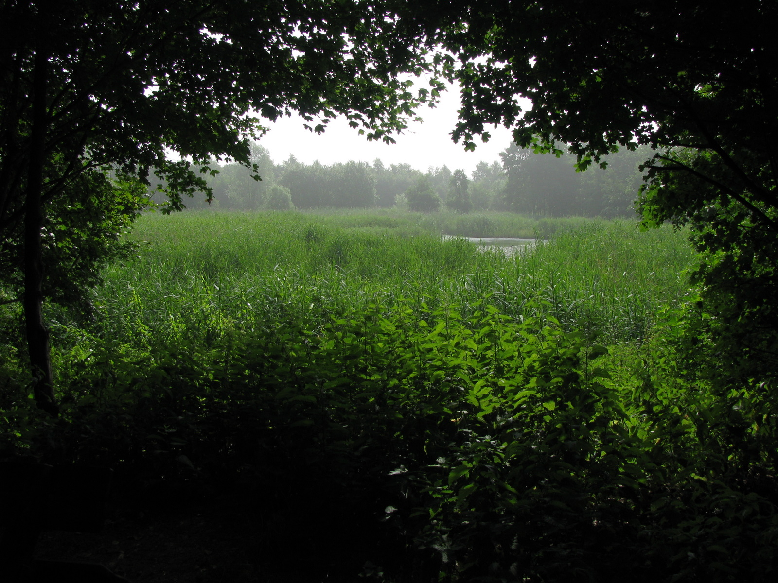 Liedermeerspark